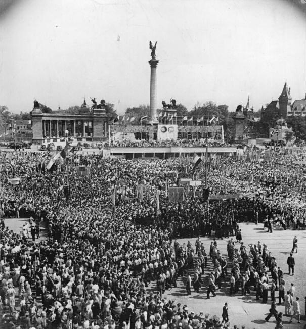 Budapest, II. Weltfestspiele, Festumzug, Helden-Platz Illus XIII-Hein-Me-9.7.51-II.Weltfestspiele der Jugend 1949 in Budapest-Die grosse Friedensdemonstration am 28.August 1949. UBz: Das Treffen der Millionen junger Friedenskämpfer auf dem Helden-Platz in Budapest.